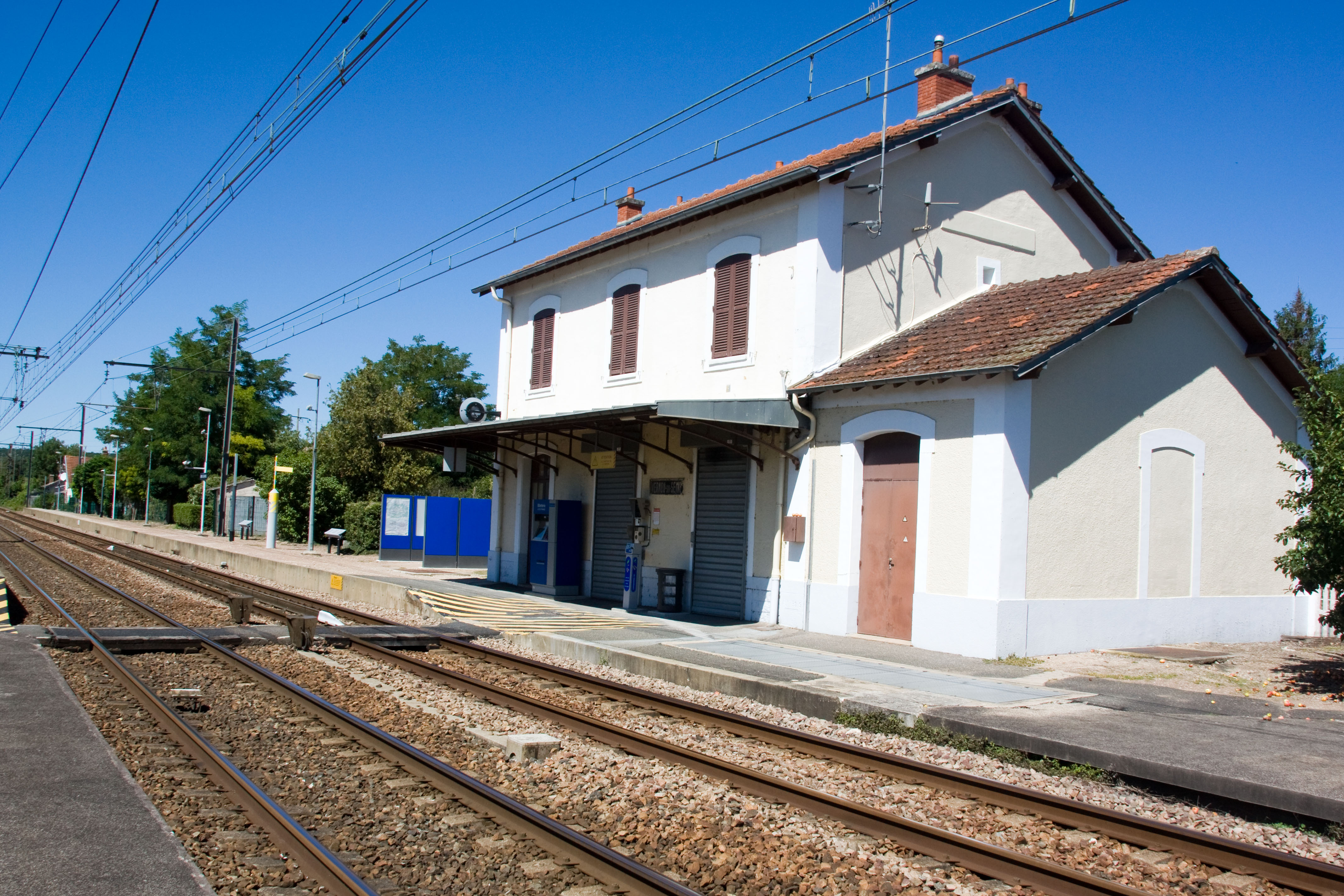 Gare de Vernou-sur-Seine, Vernou-sur-Seine, Seine-et-Marne, France